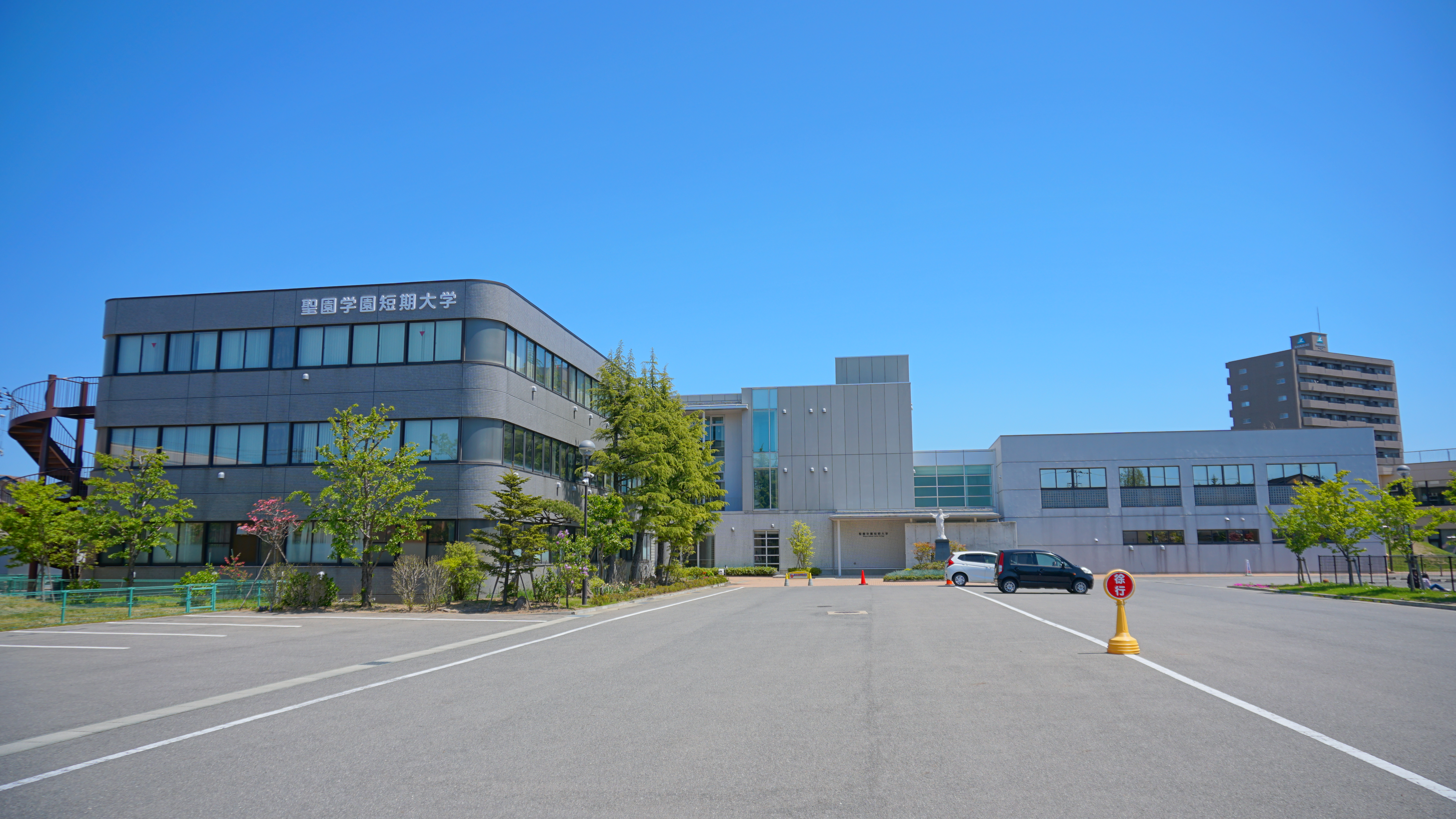 聖園学園短期大学